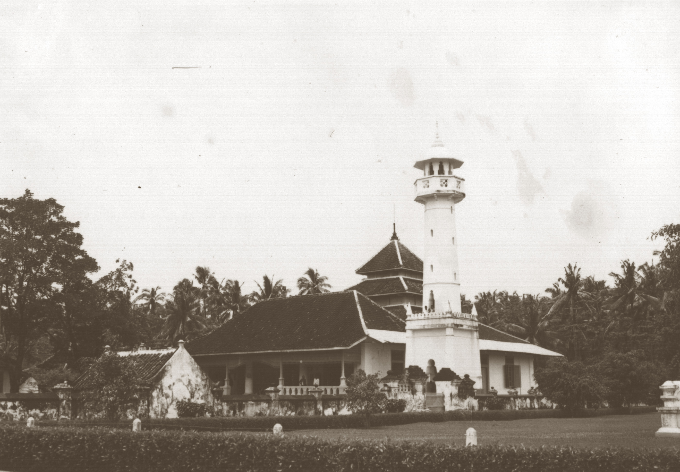 Masjid Agung Jepara pada tahun 1936. Koleksi KITLV